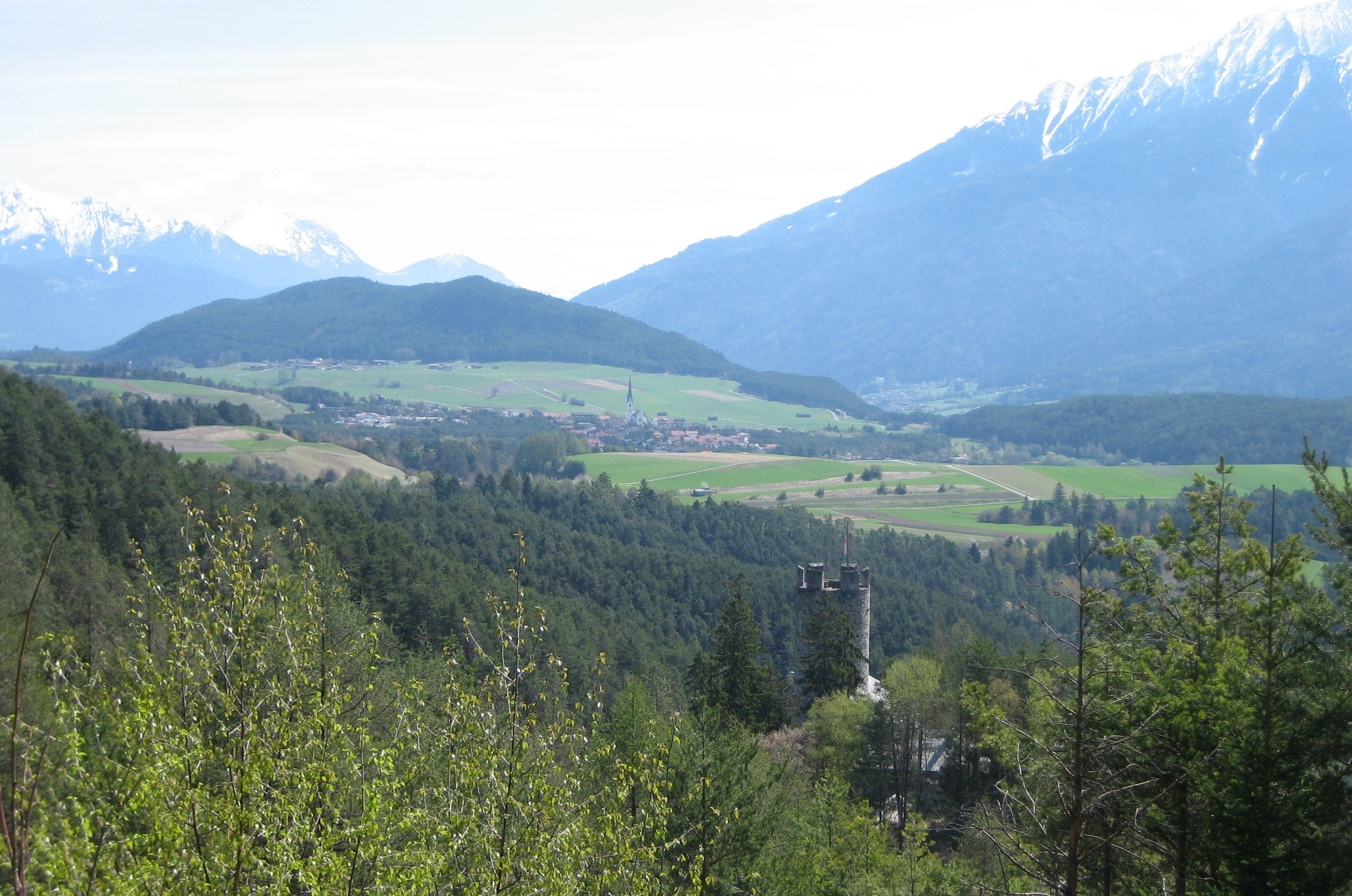 Burg Klamm und Blick über Mieming